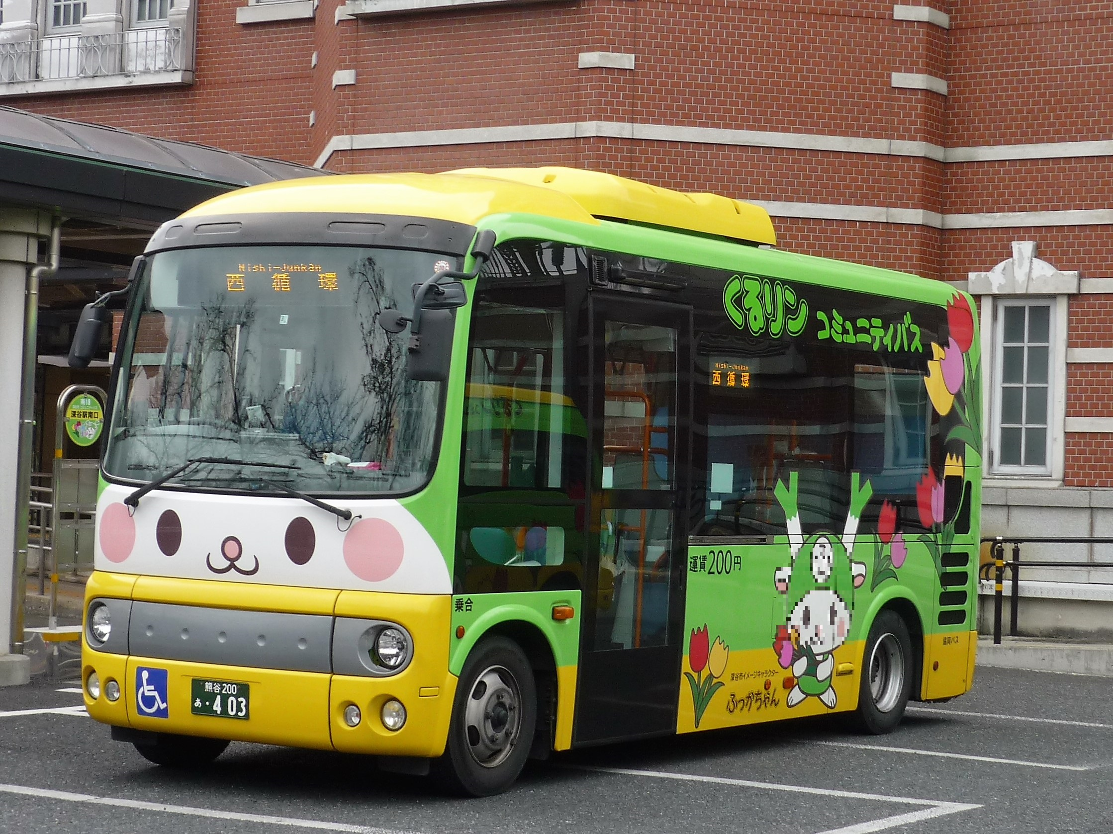 深谷市コミュニティバス「くるリン」西循環便（深谷駅南口） Panasonic Lumix DMC-FS3